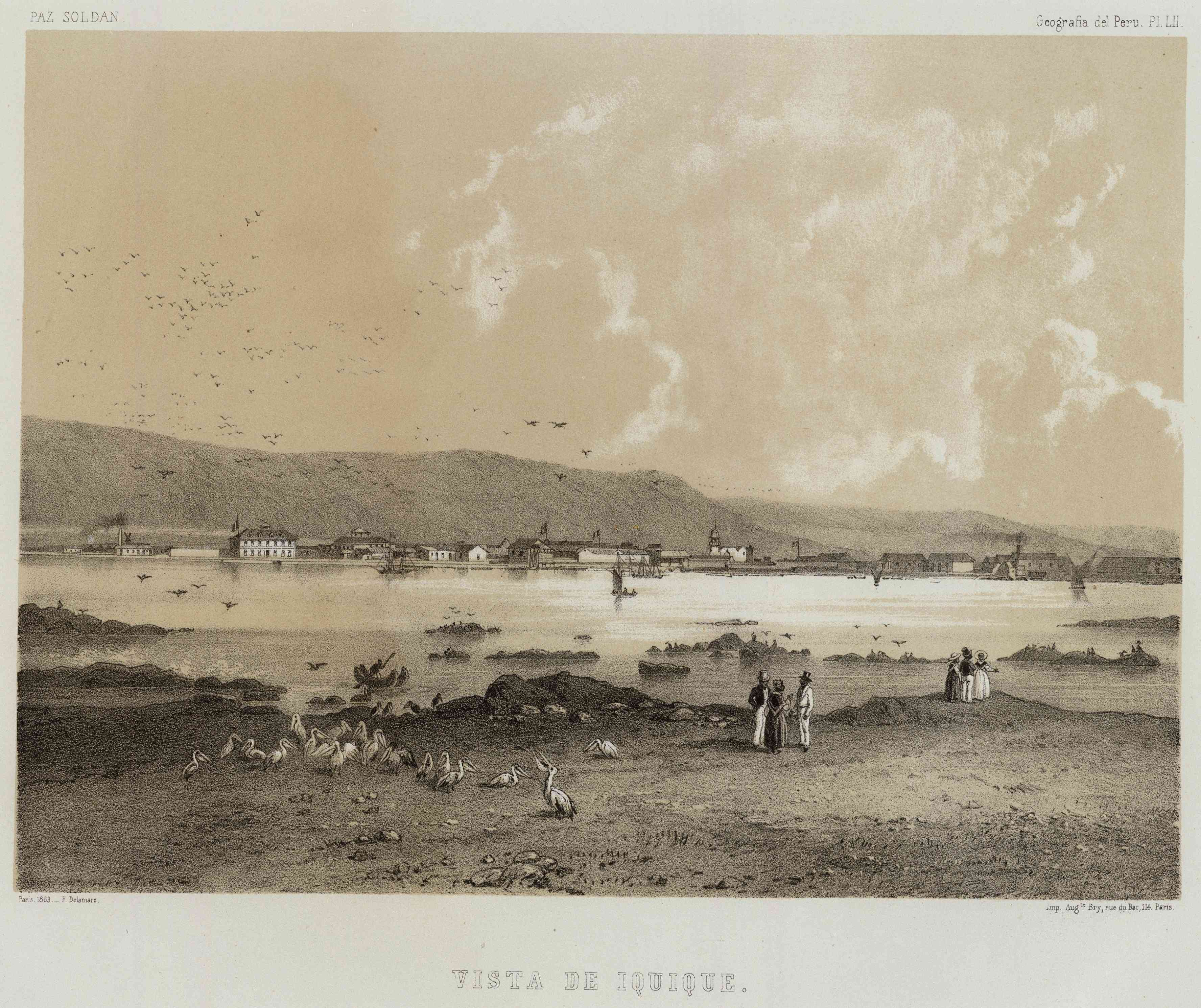 Vista de Iquique. Paz Soldan. Geografia del Peru. Paris, 1863, F. Delamare. Imp. Augte. Bry, rue de Bac, 114, Paris. (Paris: Libreria de Augusto Durand, 1865)